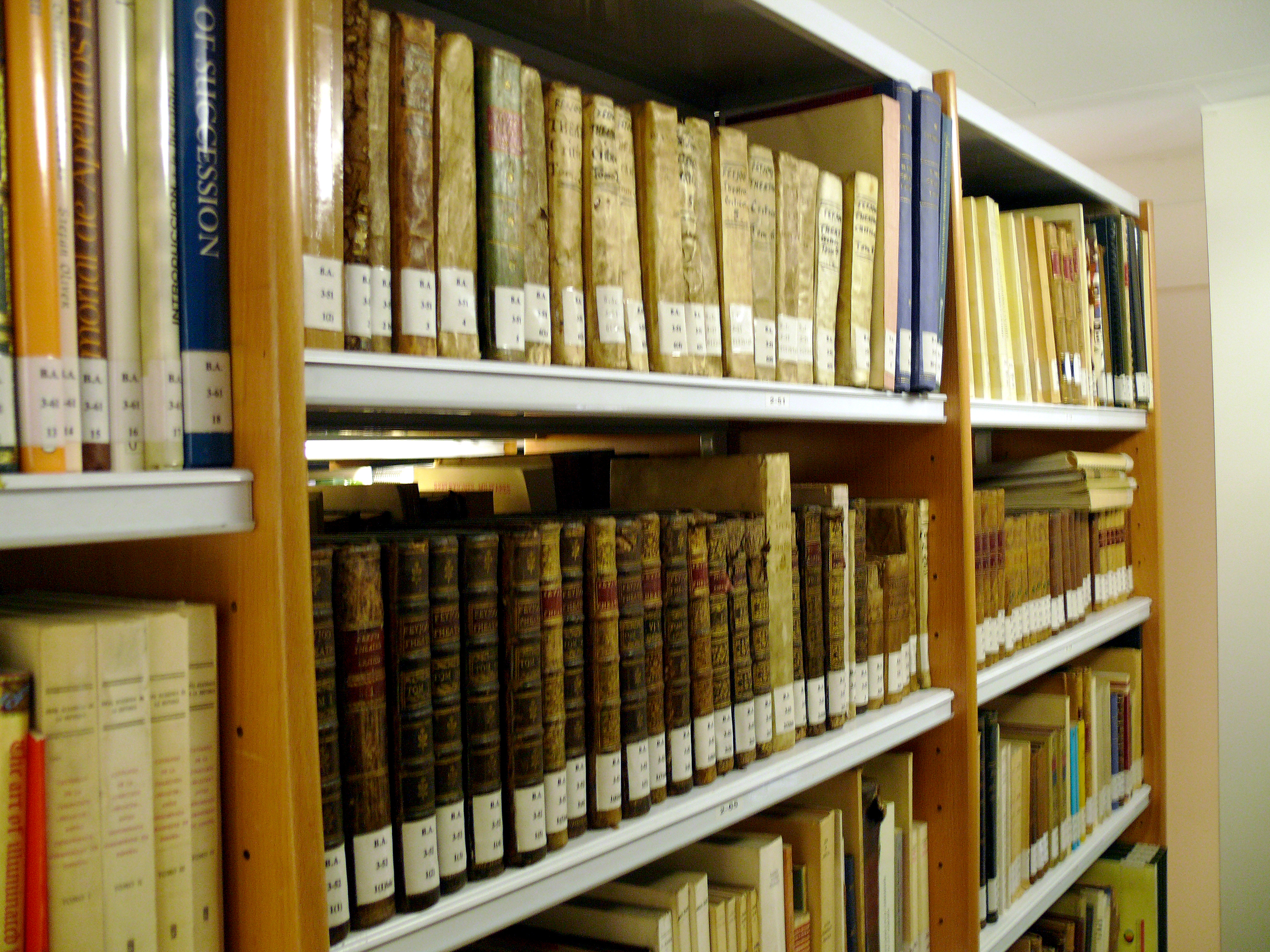 Foto Biblioteca del Padre Patac